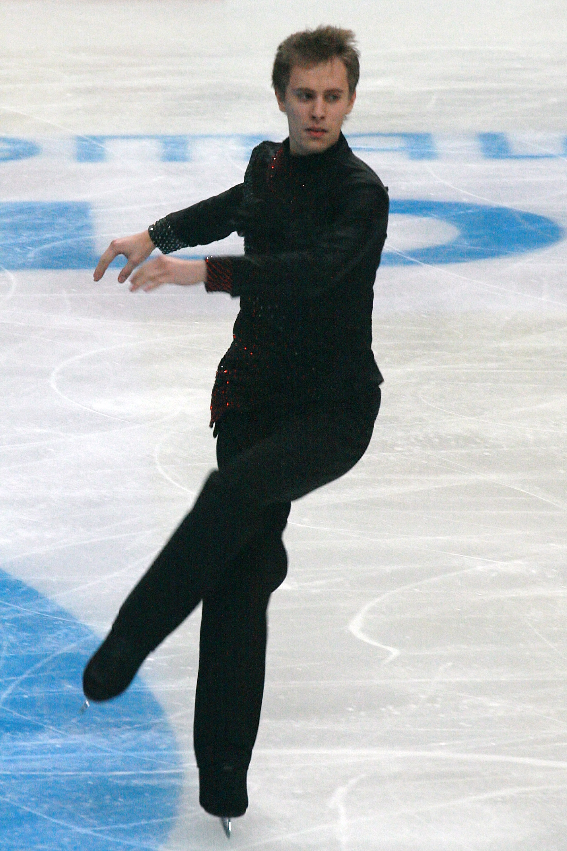 Михал Бржезина (Чехия) на Кубке Ростелекома 2012. Короткая программа.